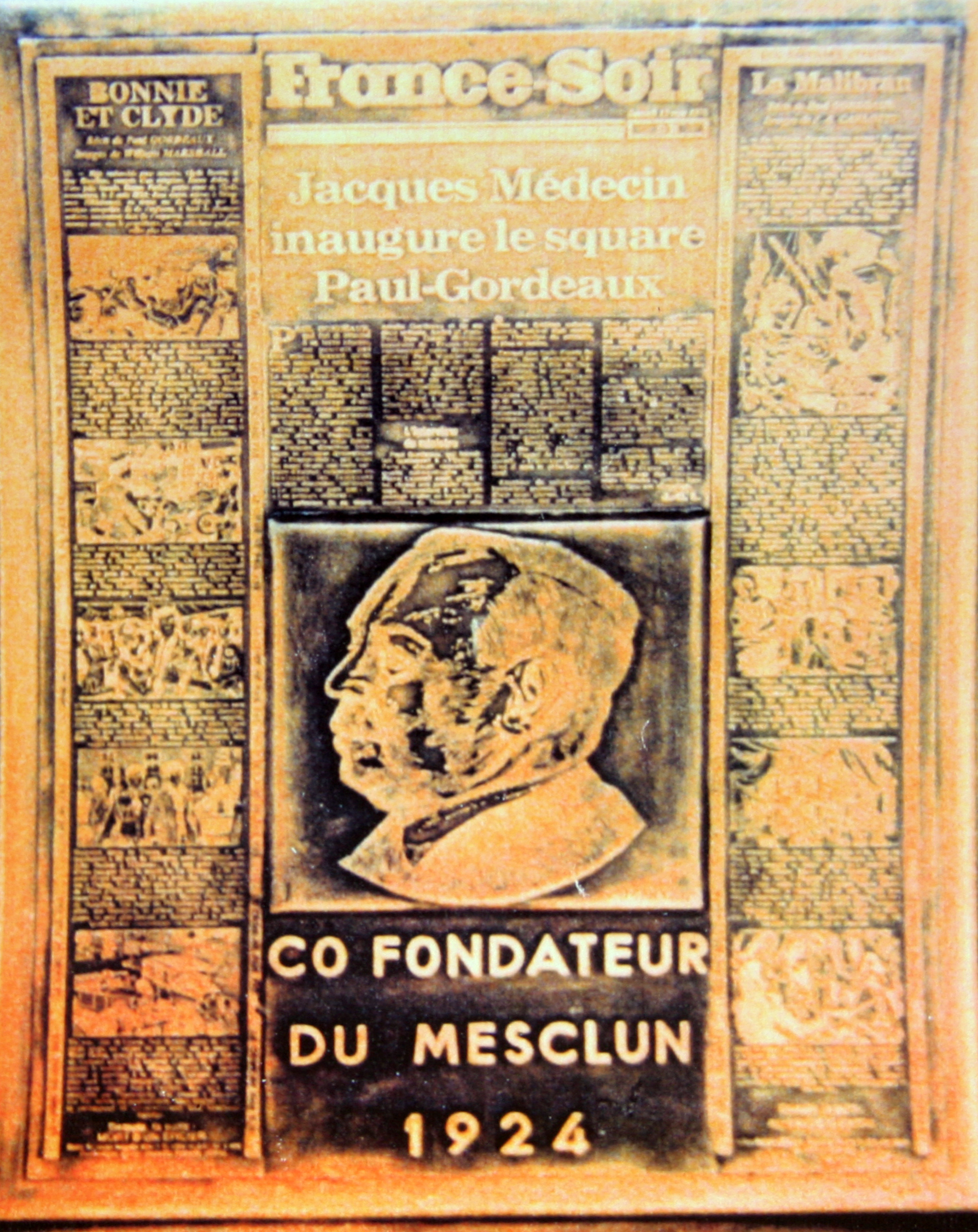 plaque commémorative sur la stèle de Paul Gordeaux à Nice représentant une page du journal France-Soir avec les bandes verticales "Le Crime ne paie pas" et "les Amours Célèbres" qui encadrent son portrait et la plaque de co-Président de "Lou Mesclun"